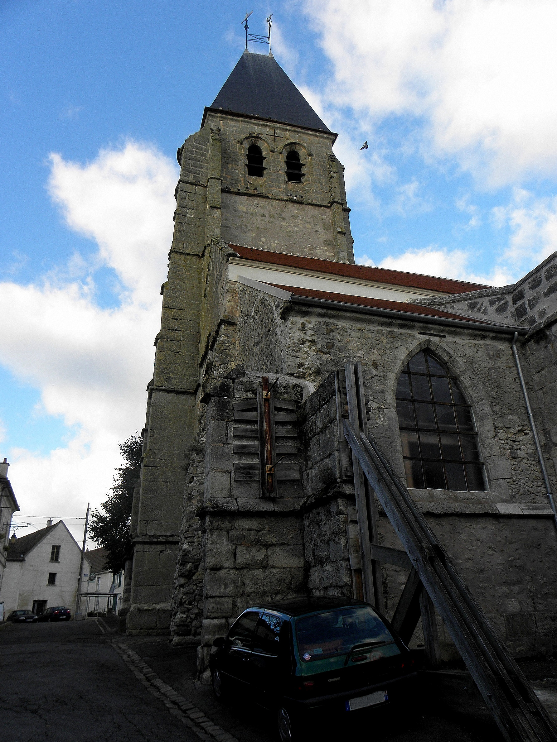 Église Saint-Jean-Baptiste d'Étrépilly (77).